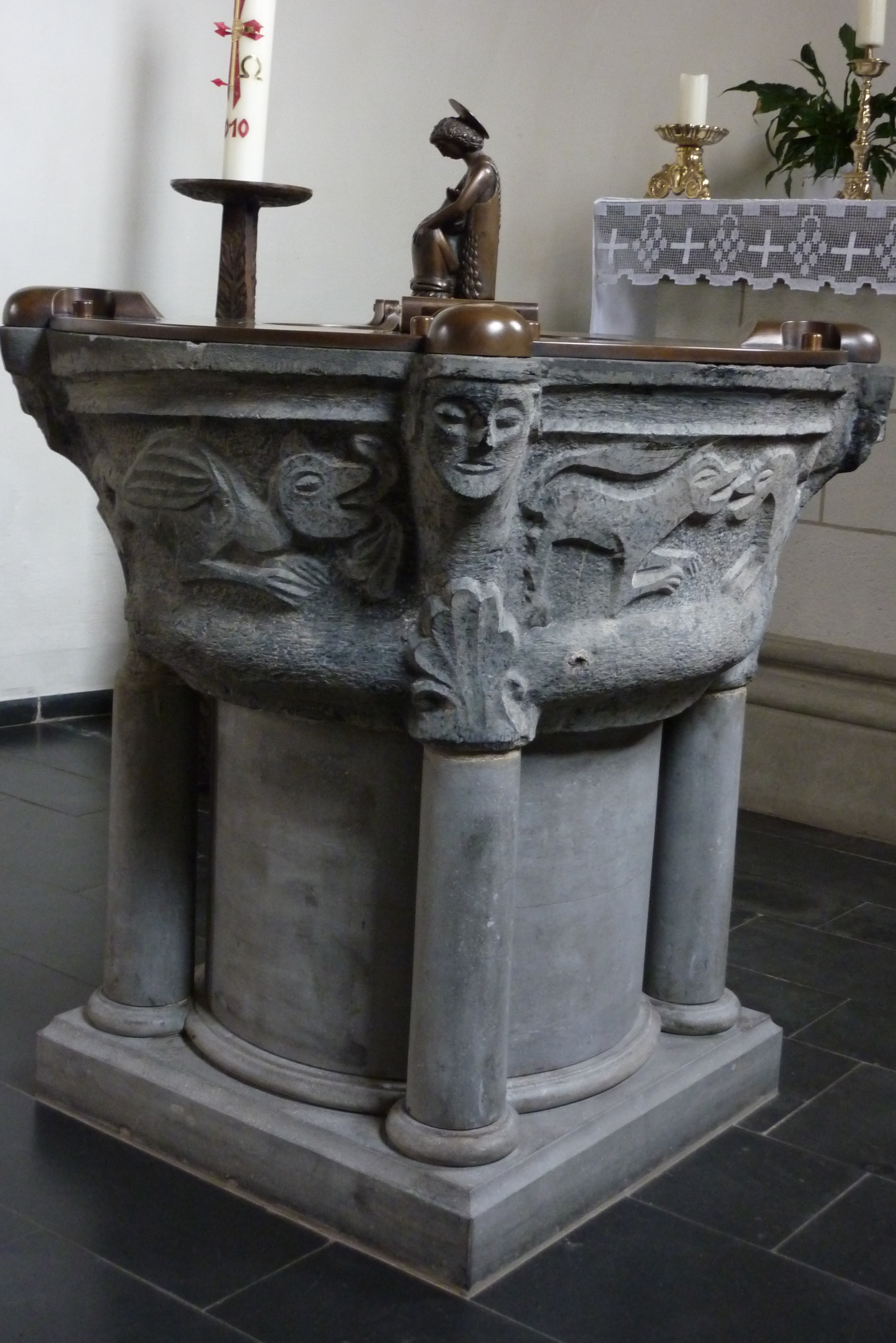 Taufbecken in der katholischen Pfarrkirche St. Georg in Frauenberg, 12. Jahrhundert (Sockel von 1994), aus Namurer Blaustein